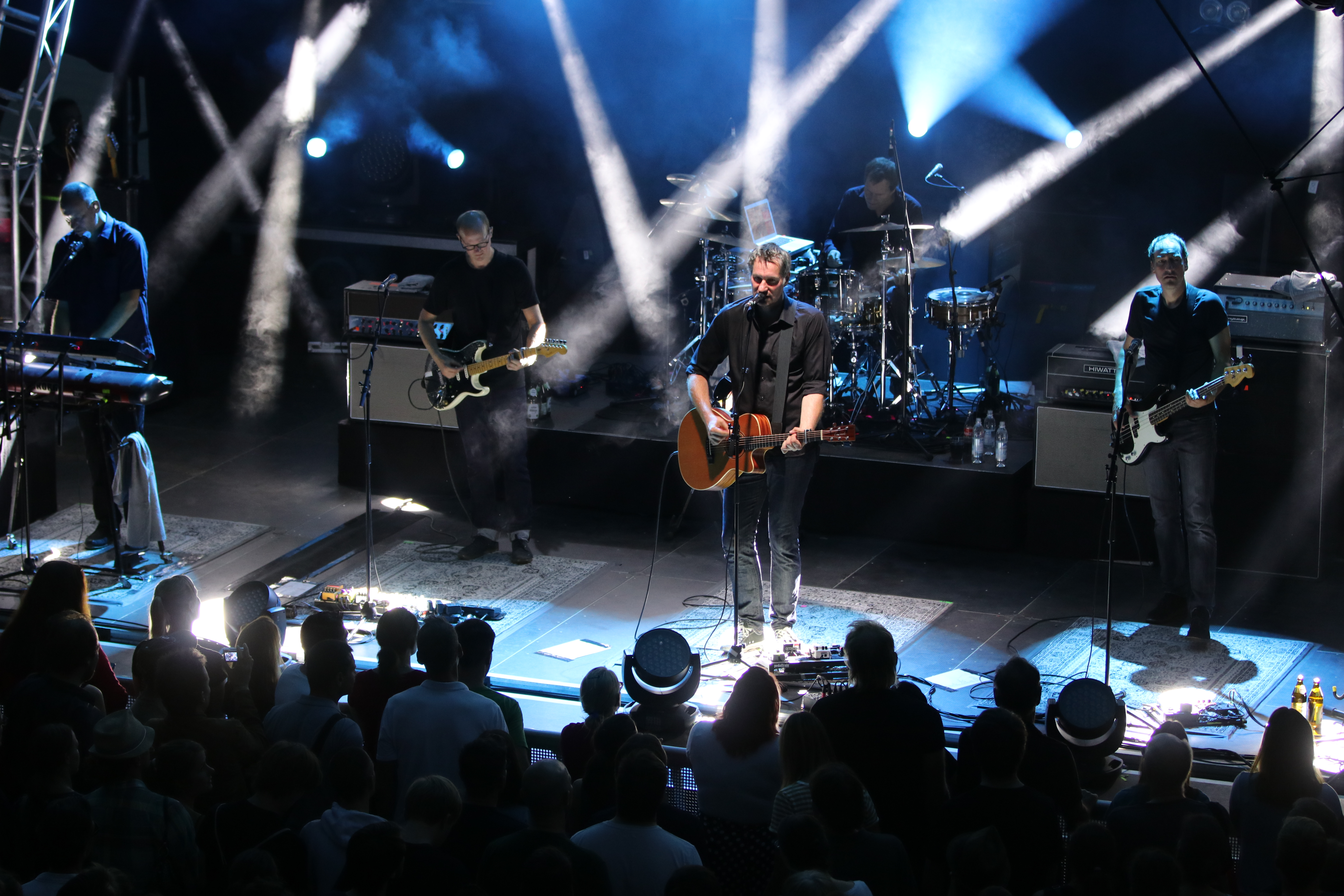 Kettcar am 17. August 2018 im Münchner Theatron